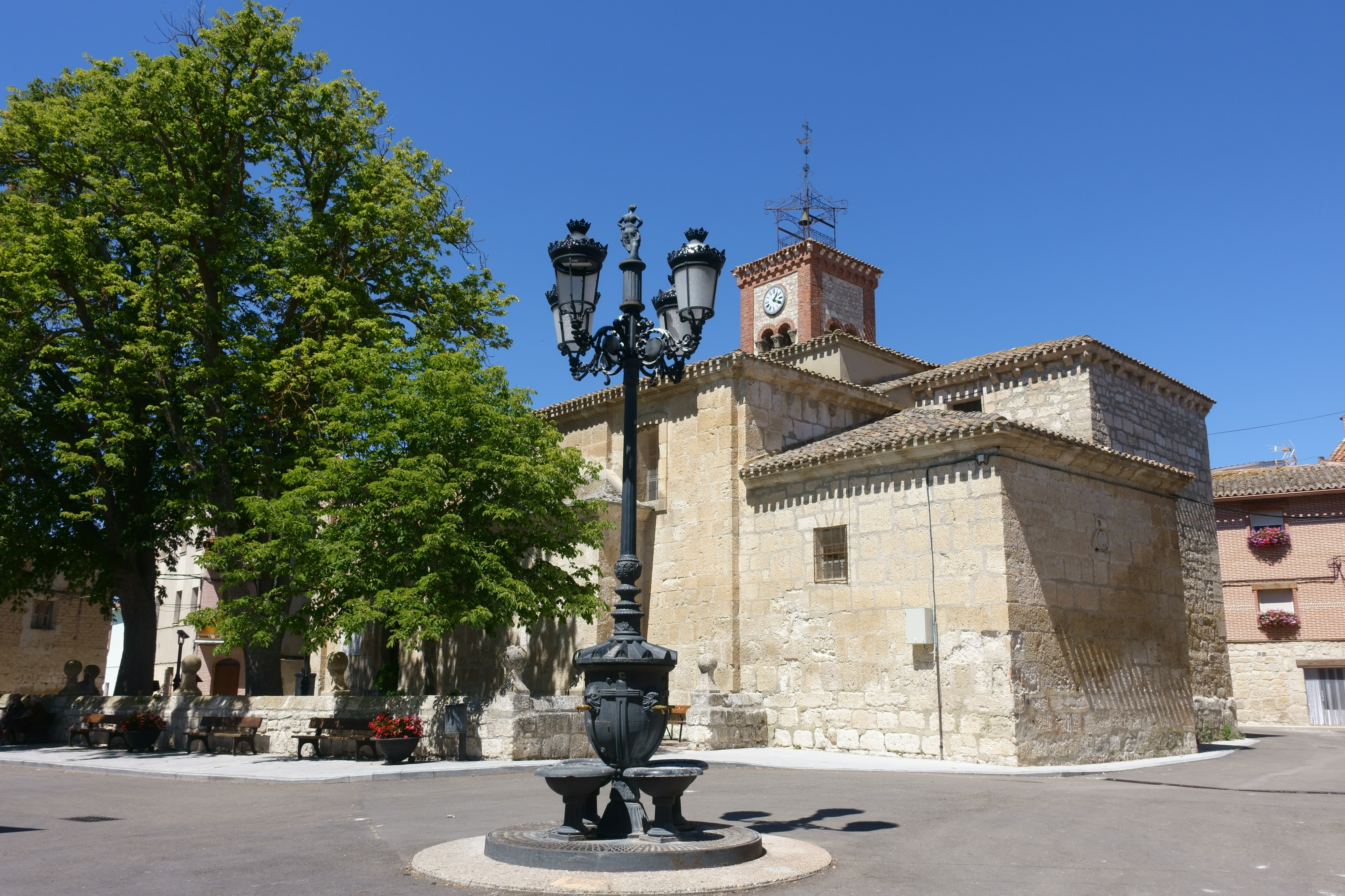 Iglesia de Nuestra Señora de la Asunción, Antigüedad (Palencia, España).